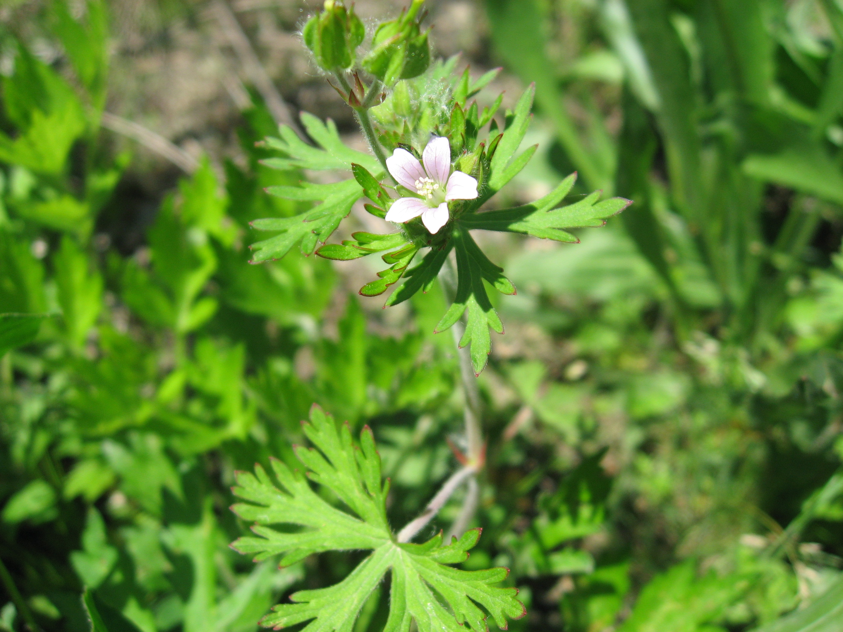 福島県会津若松市